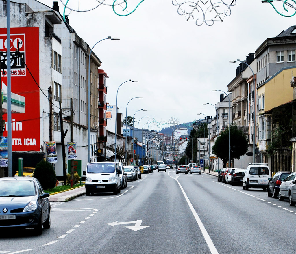 Estrada de Castela vista dende o Alto do Castiñeiro, Narón